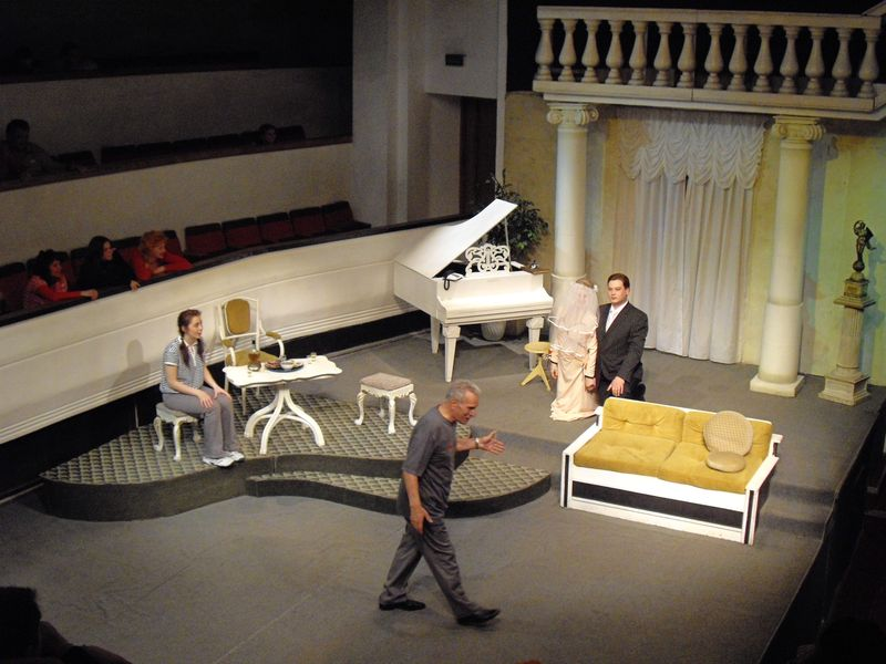 Малая сцена симферопольского русского театра.